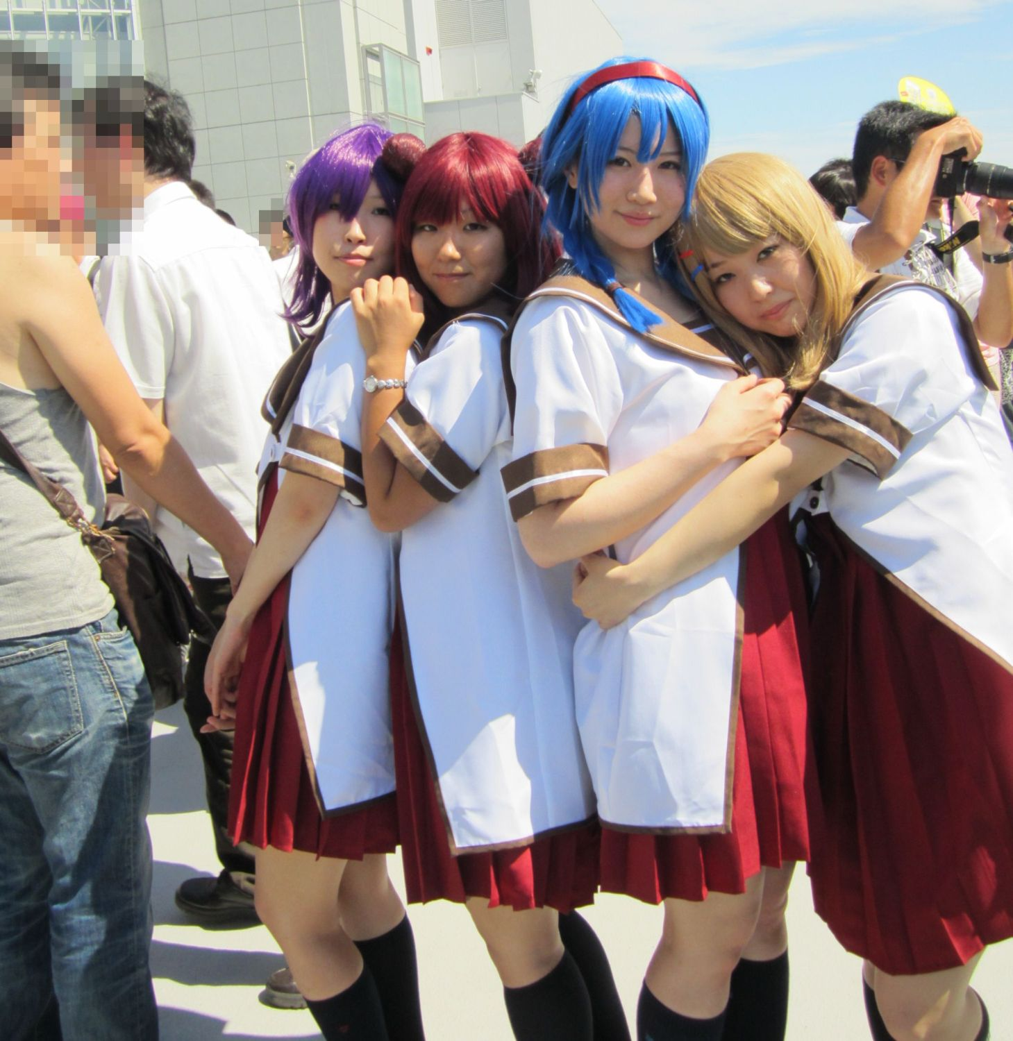 Comic Market 82，《輕鬆百合》cosplayer群。